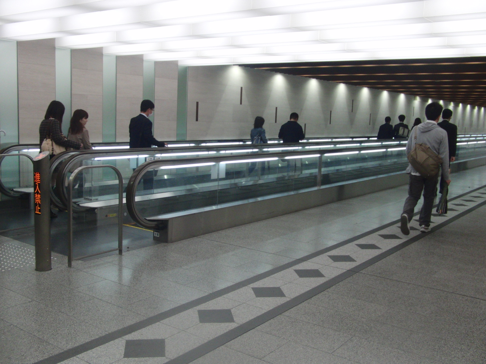 梅田駅にて撮影